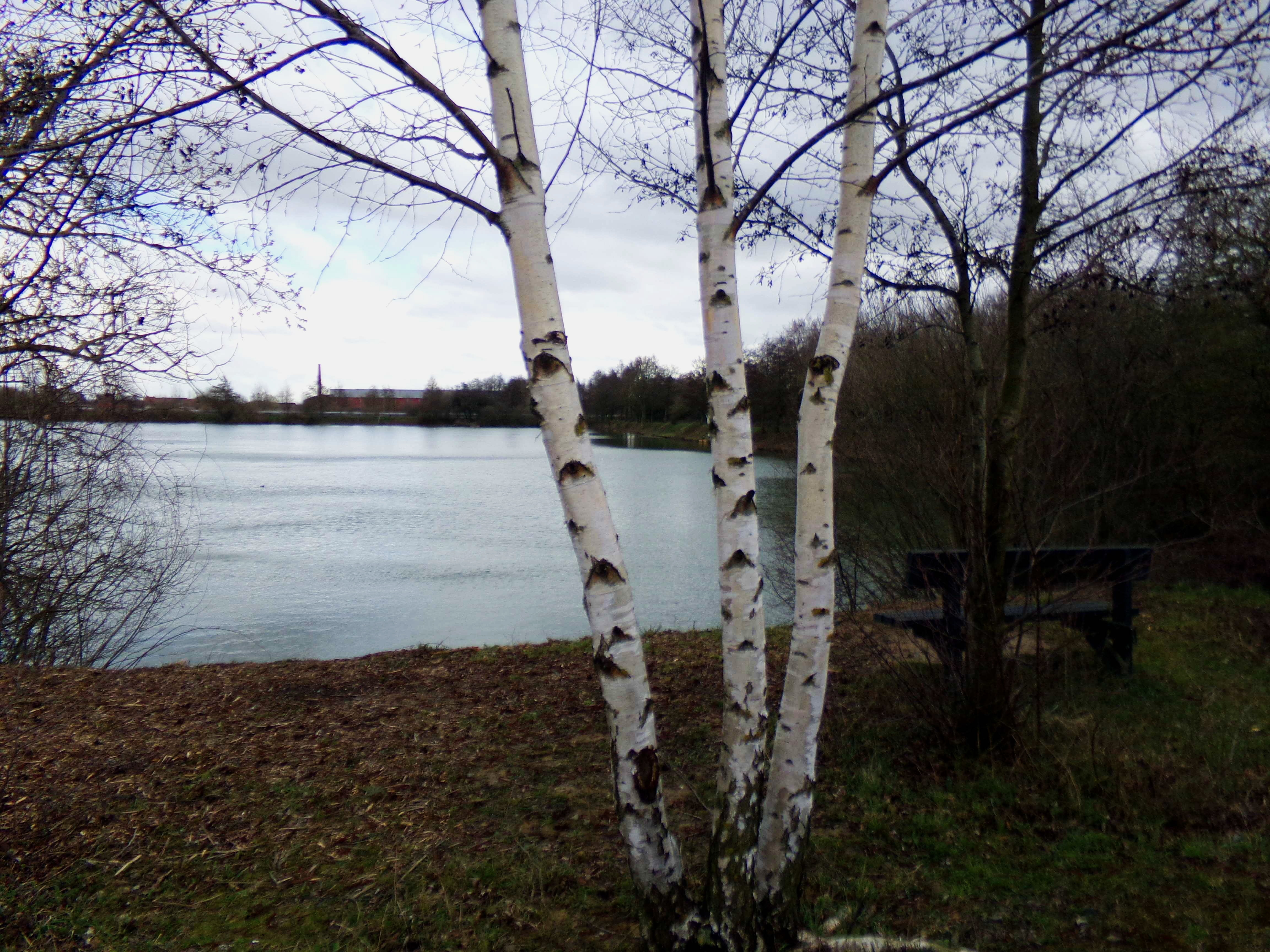 Comines-Warneton Ploegsteert la réserve naturelle